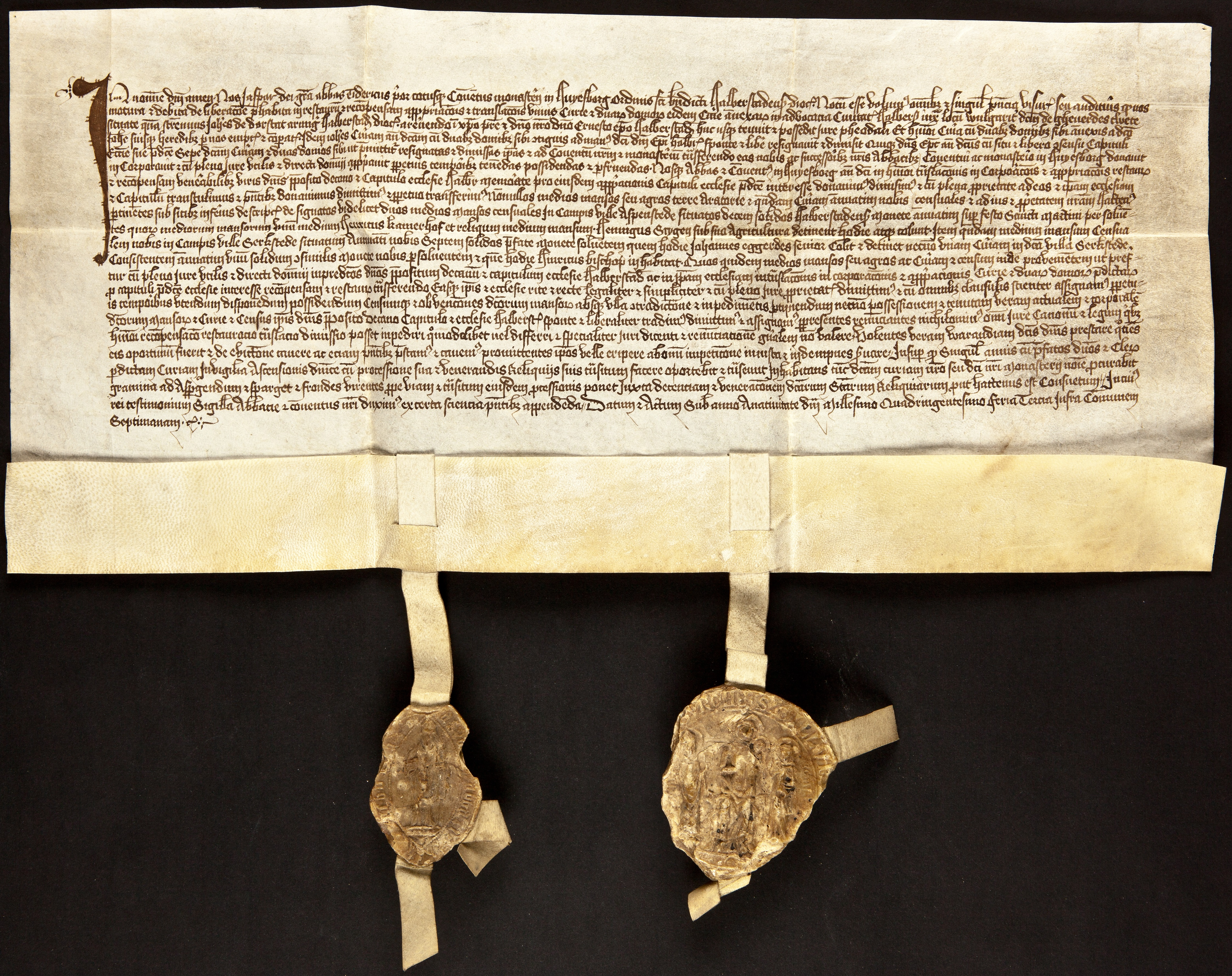 „Bischof Ernst von Halberstadt übereignet dem Kloster Huysburg unter Abt Jasper (Edler von Berwynkel) und Prior Dietrich eine Kurie auf der Vogtei in Halberstadt, den der Knappe Johann von Dorstadt dem Bischof aufgelassen hat. 6. Oktober 1400“. – Abt Jasper hatte diesen großen Hof (sog. Abtshof), bestehend aus 13–14 Häuser und zwei anliegende Häuser neben der Gebhards-Straße für 46 Mark von Johann von Dorstadt gekauft. Mit dieser Urkunde bestätigt der Bischof den Kauf und befreit außerdem Abtshof und Häuser von allen Vogteilasten. – Anhängend das Siegel von Abt Jasper (links) und das Konventsiegel von Kloster Huysburg. Es zeigt die auf einem Thron sitzende Maria mit dem auf ihrem li. Schenkel stehende Kind. An ihrer Seite begleiten sie zur Linken die hl. Maria Magdalena und zu ihrer Rechten der hl. Gregor. Umschrift: +SIGILLVM•SANCTE• MARIE•VIRGINIS•IN HVYSBVRCH.